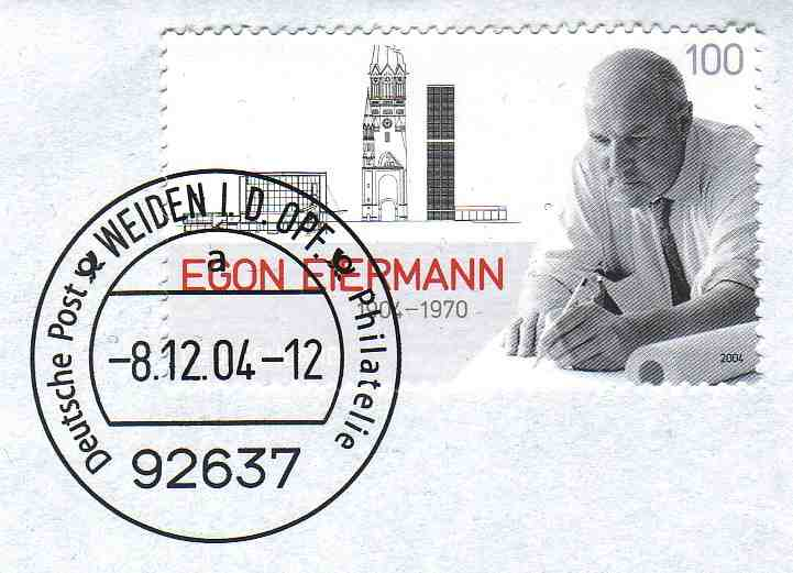 Deutsche Briefmarke mit Egon Eiermann (1904 - 1970) Stempelbeschriftung: 8. Dezember 2004 - 12 Uhr Deutsche Post - Philatelie Postleitzahl 92637 Weiden in der Oberpfalz